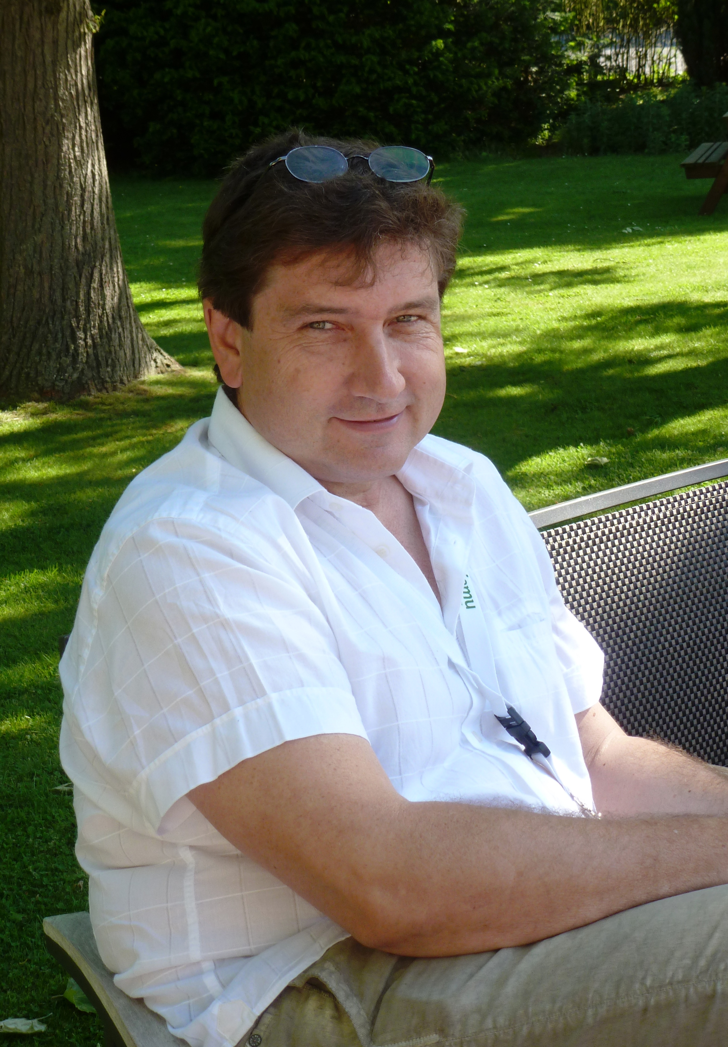 Robert Sterba, Radrennfahrer, Fahrradproduzent und Sammler aus der Tschechei (Tschechoslowakei)